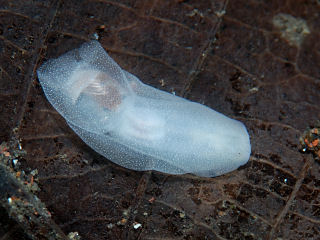 Philine orientalis, 12 m de profundidad, Osezaki, Japón